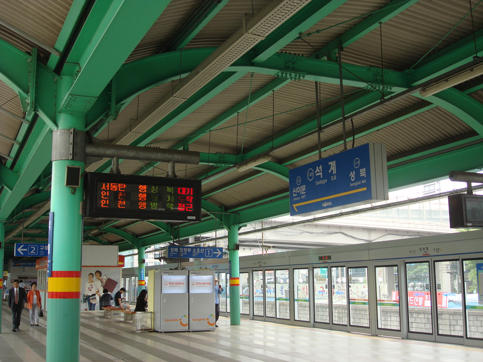 1호선 석계역 역명판